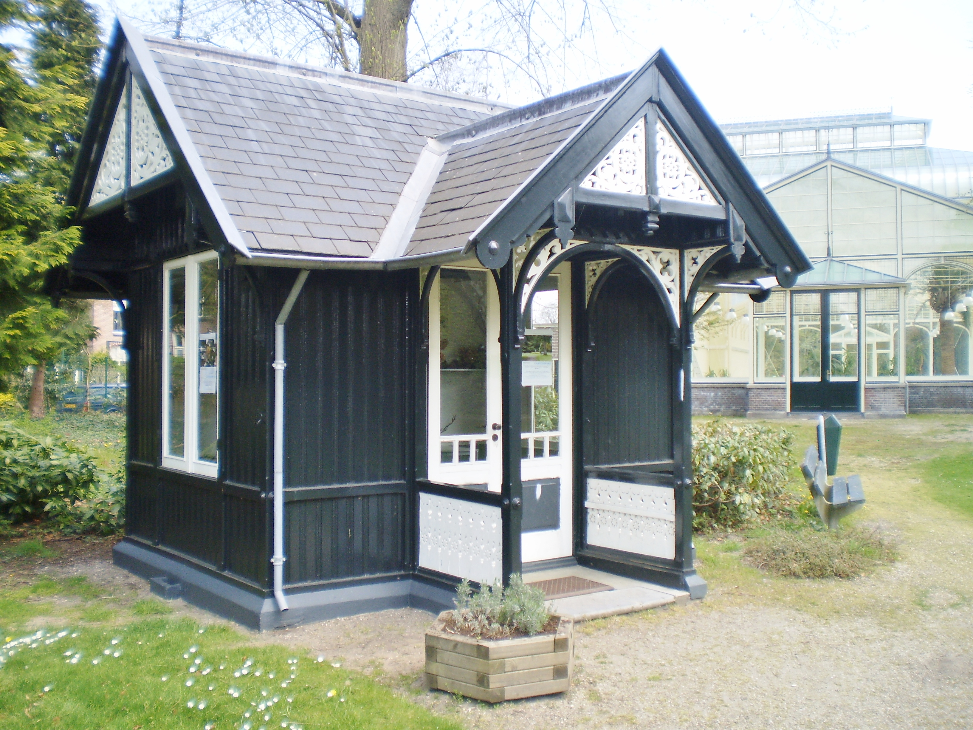 Op de achtergrond de Wintertuin